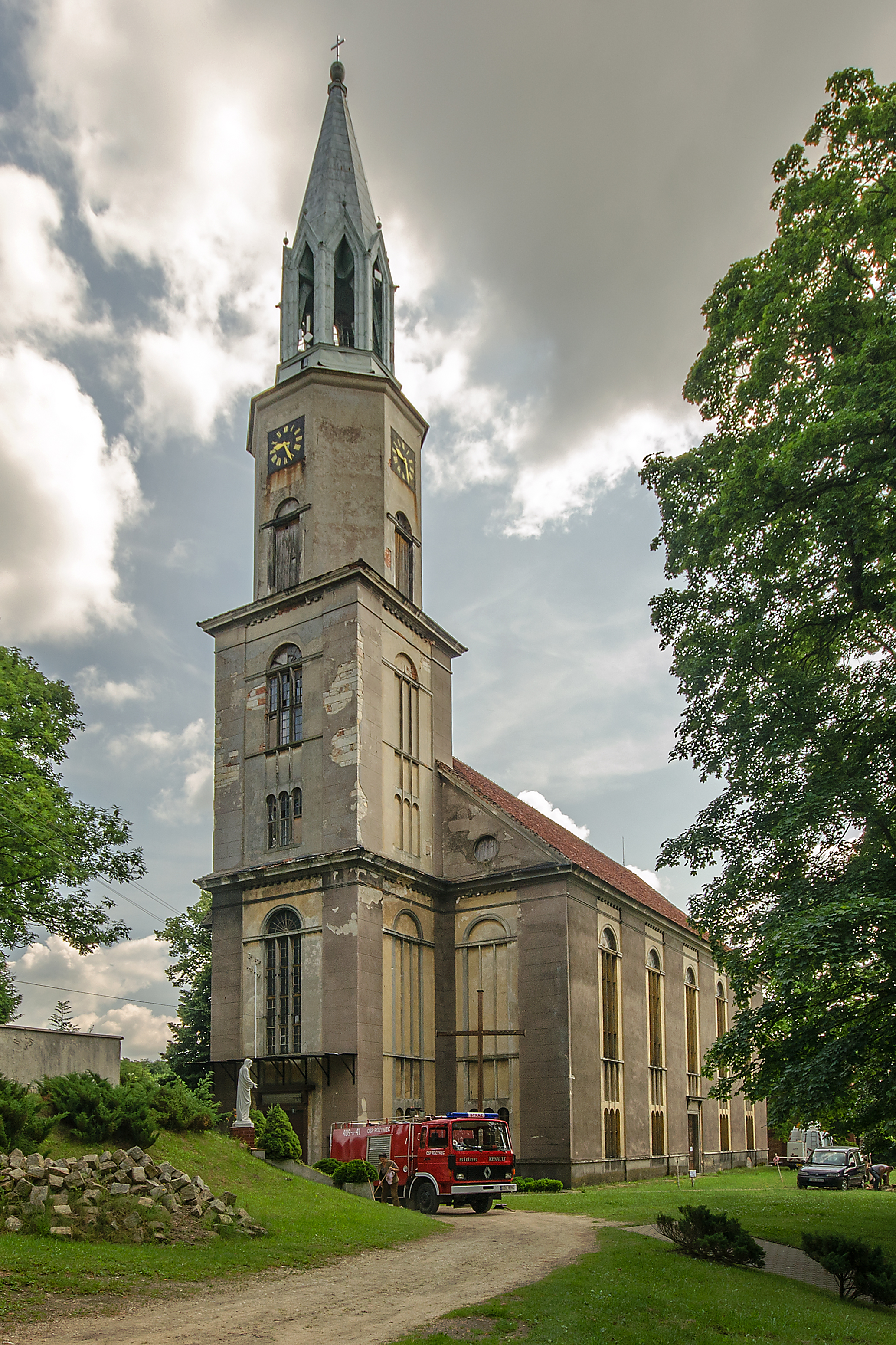 Osła - dawny kościół ewangelicki, obecnie rzymskokatolicki parafialny pw. śś. Piotra i Pawła, 1826